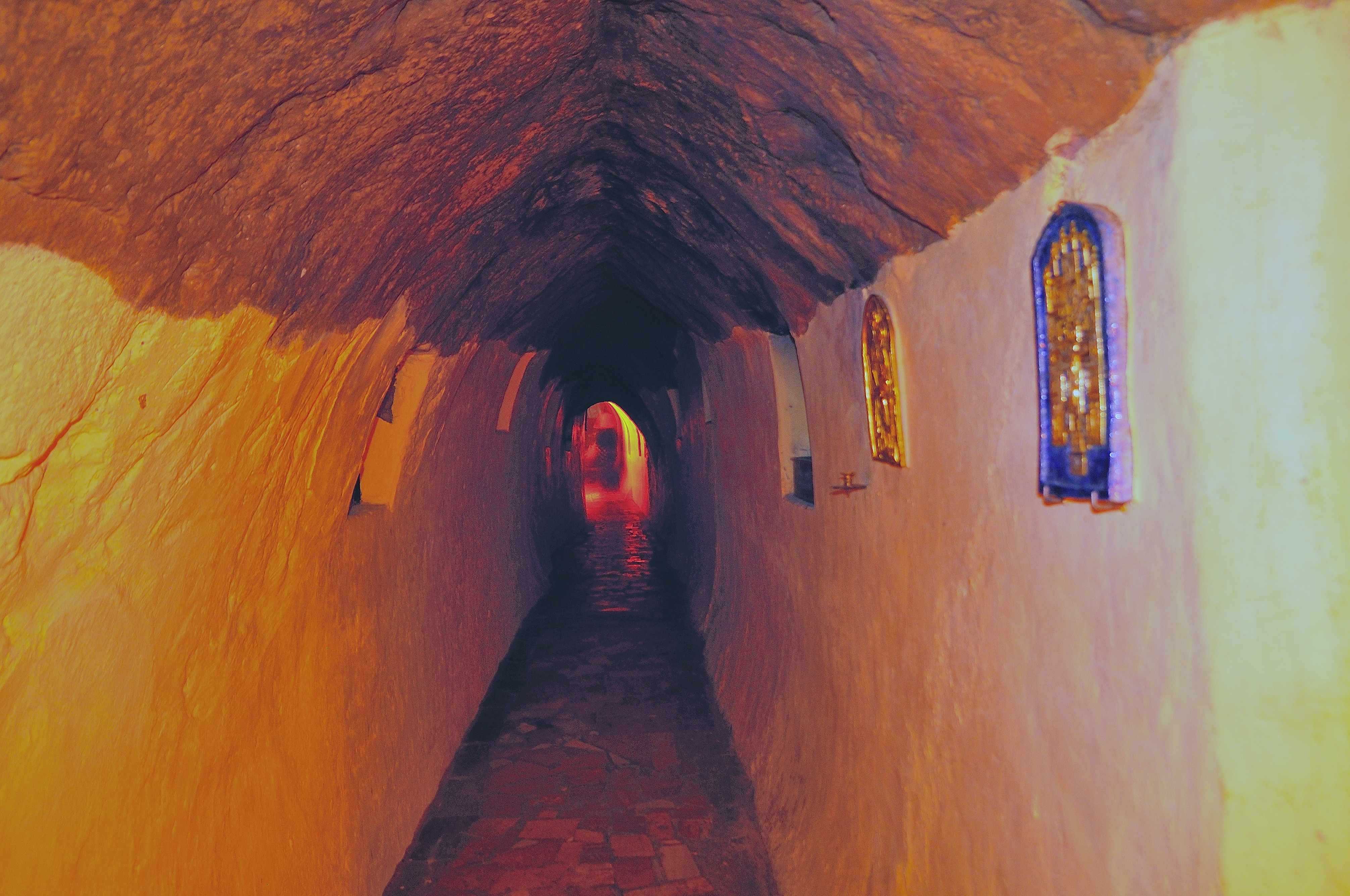 Звіринецькі печери з настінними написами, Київ, Мічуріна вул., 18-22